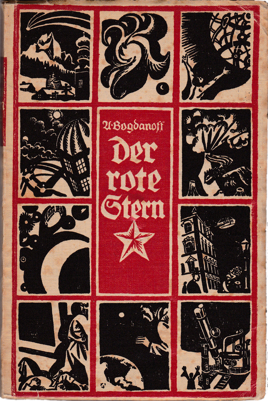 Bogdanoff - Der rote Stern